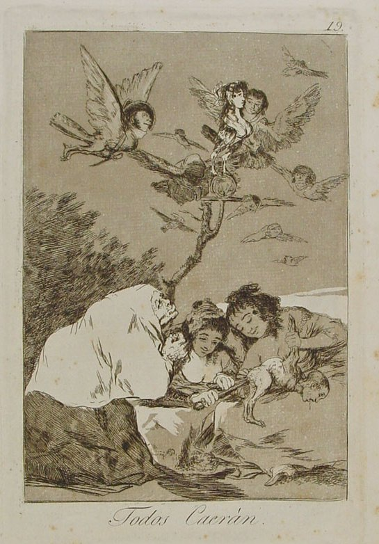 Capricho nº 19: Todos caerán de Goya, serie Los Caprichos